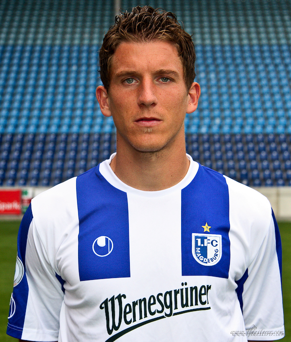 Daniel Bauer im Trikot des 1.FC Magdeburg.